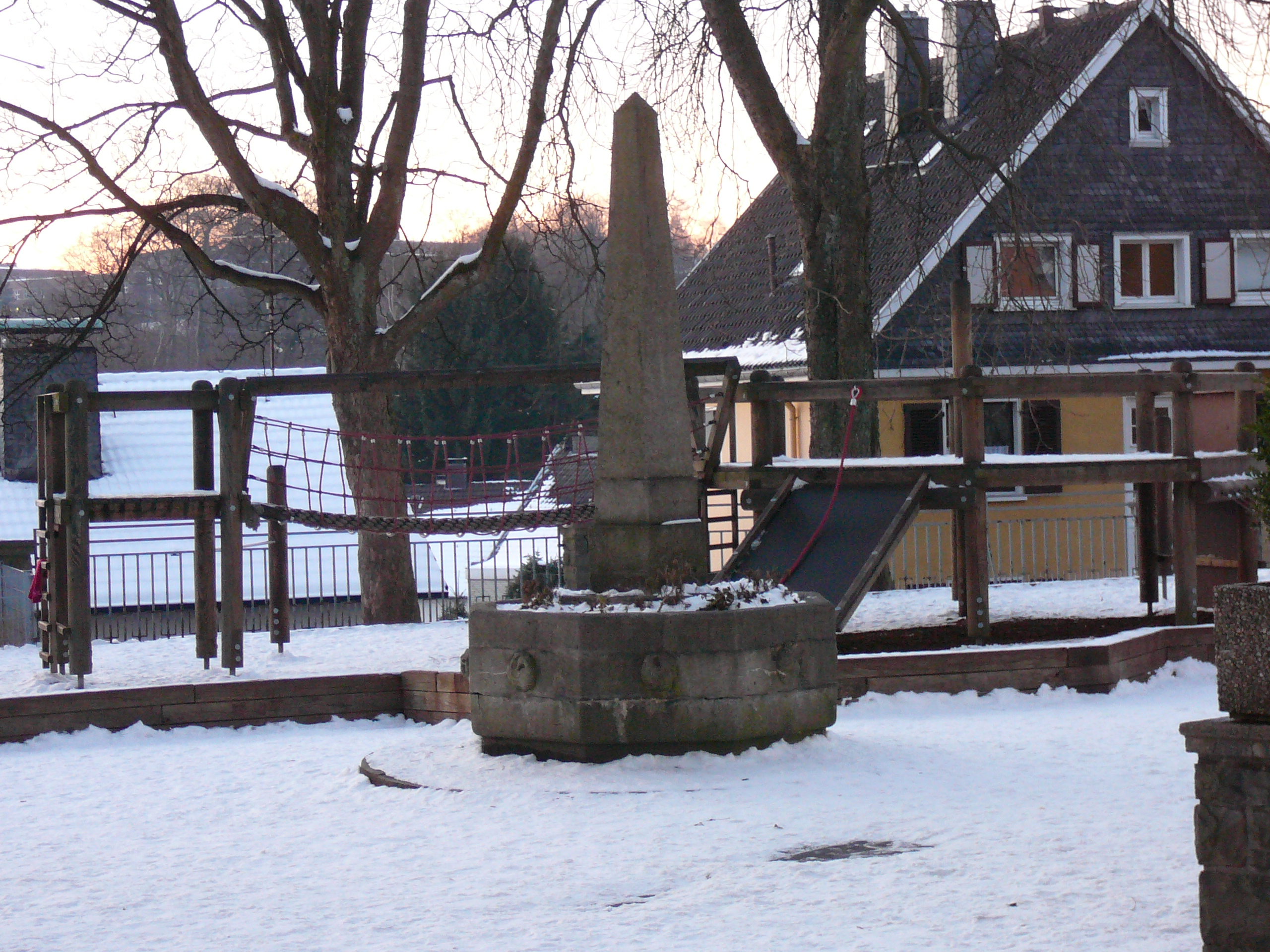 Eichenstraße, Wuppertal